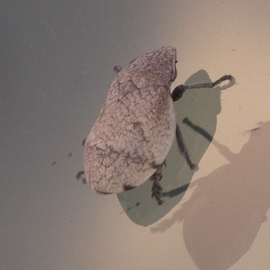 Lepyronia gibbosa, Hill-Prairie Spittlebug, ID Confidence: 98